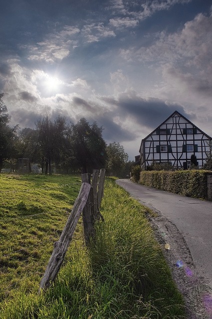 Der Essener Stadtteil Fischlaken